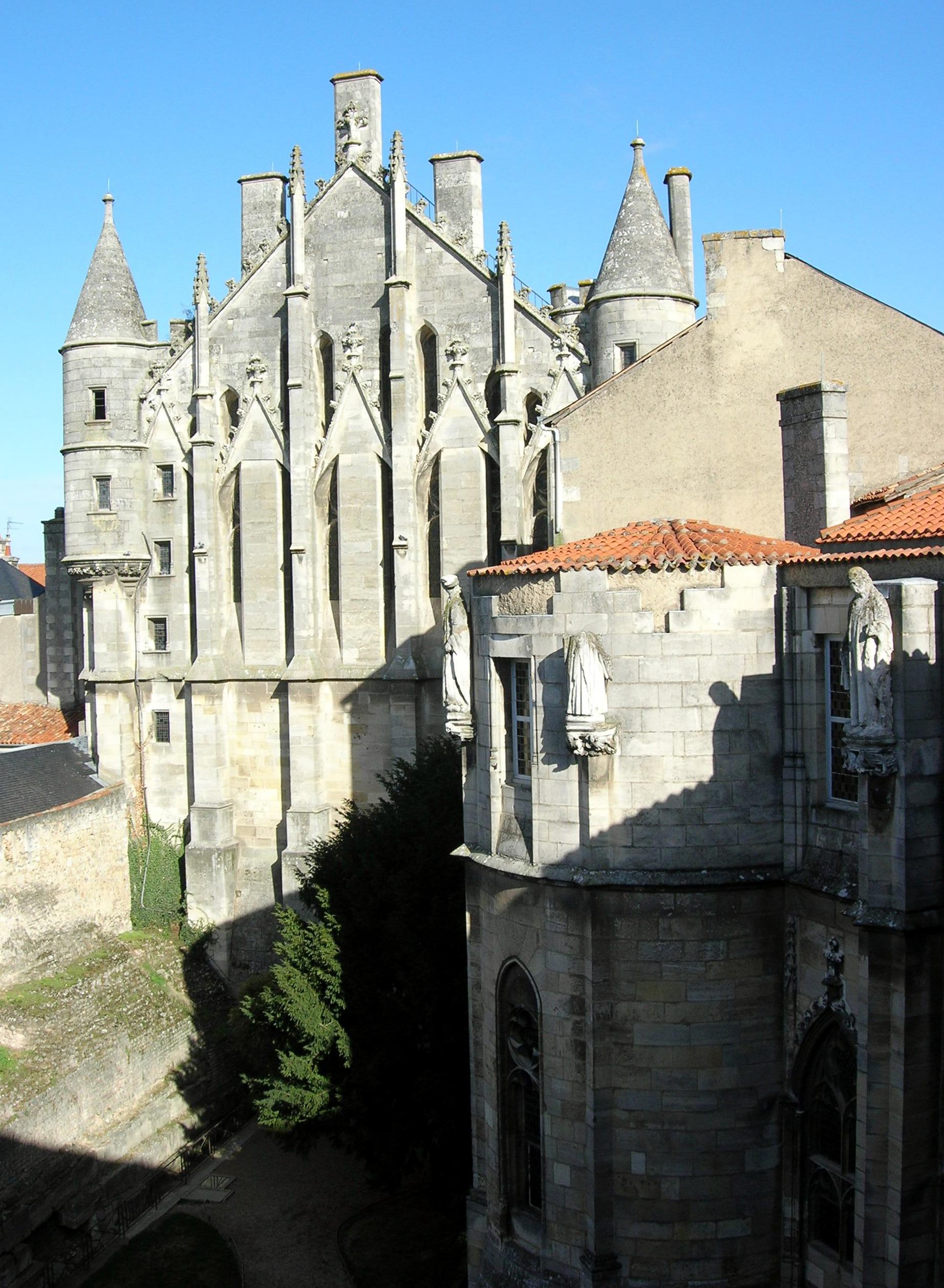 Palais de justice de Poitiers (Vienne, France).